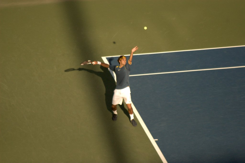 Roger Federer serving.